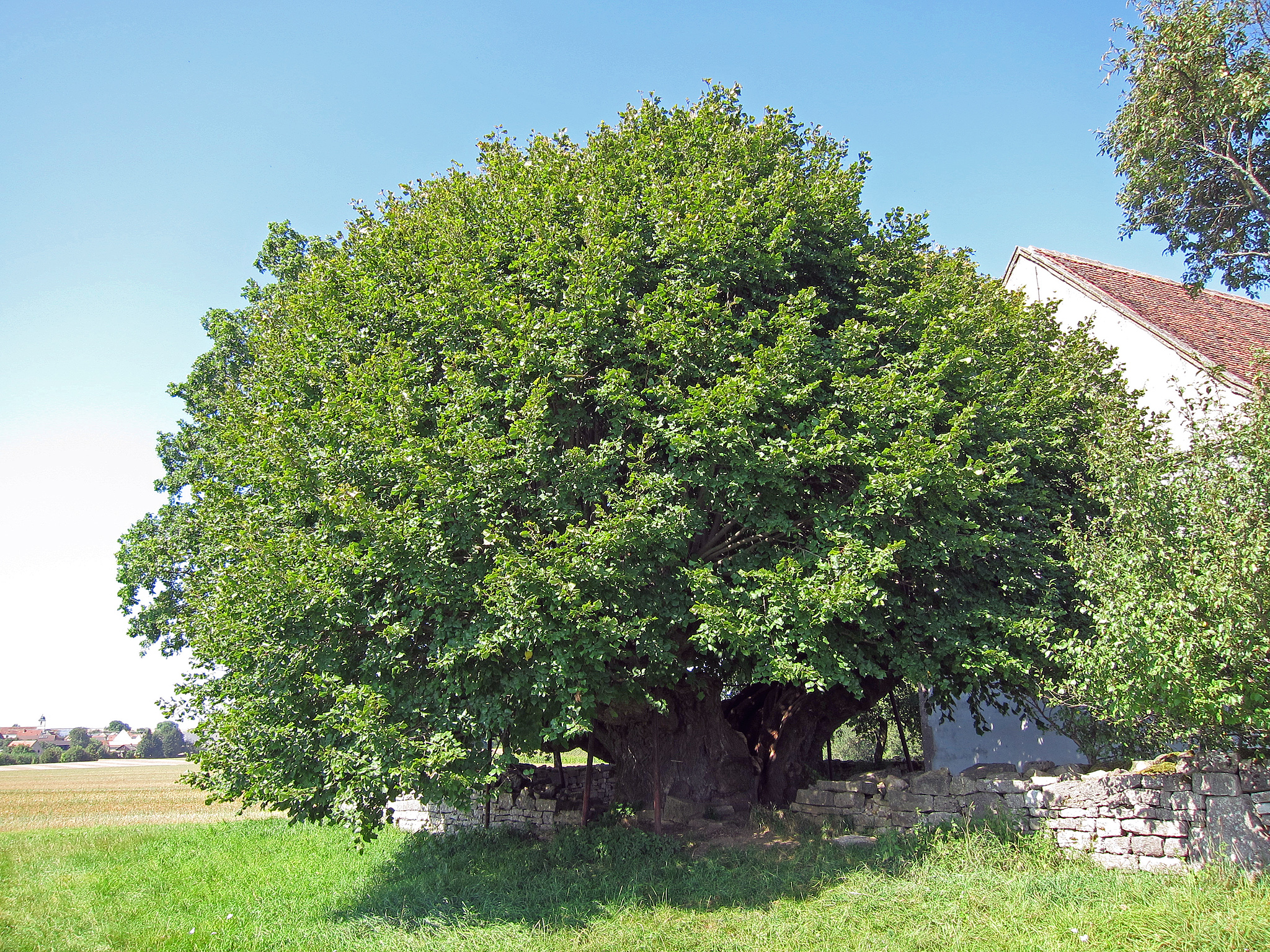 Kunigundenlinde Burgerroth